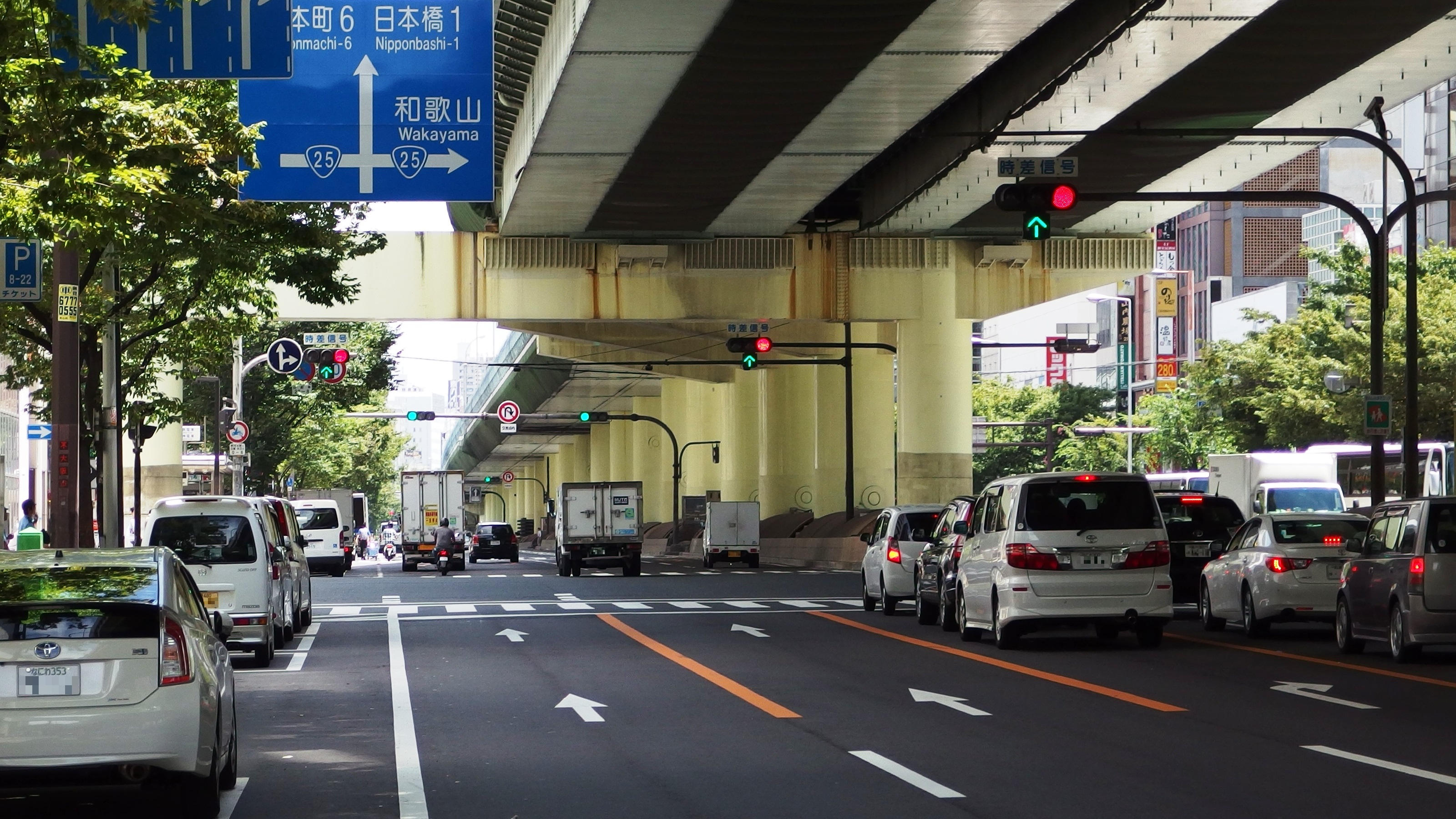 千日前通・難波交差点